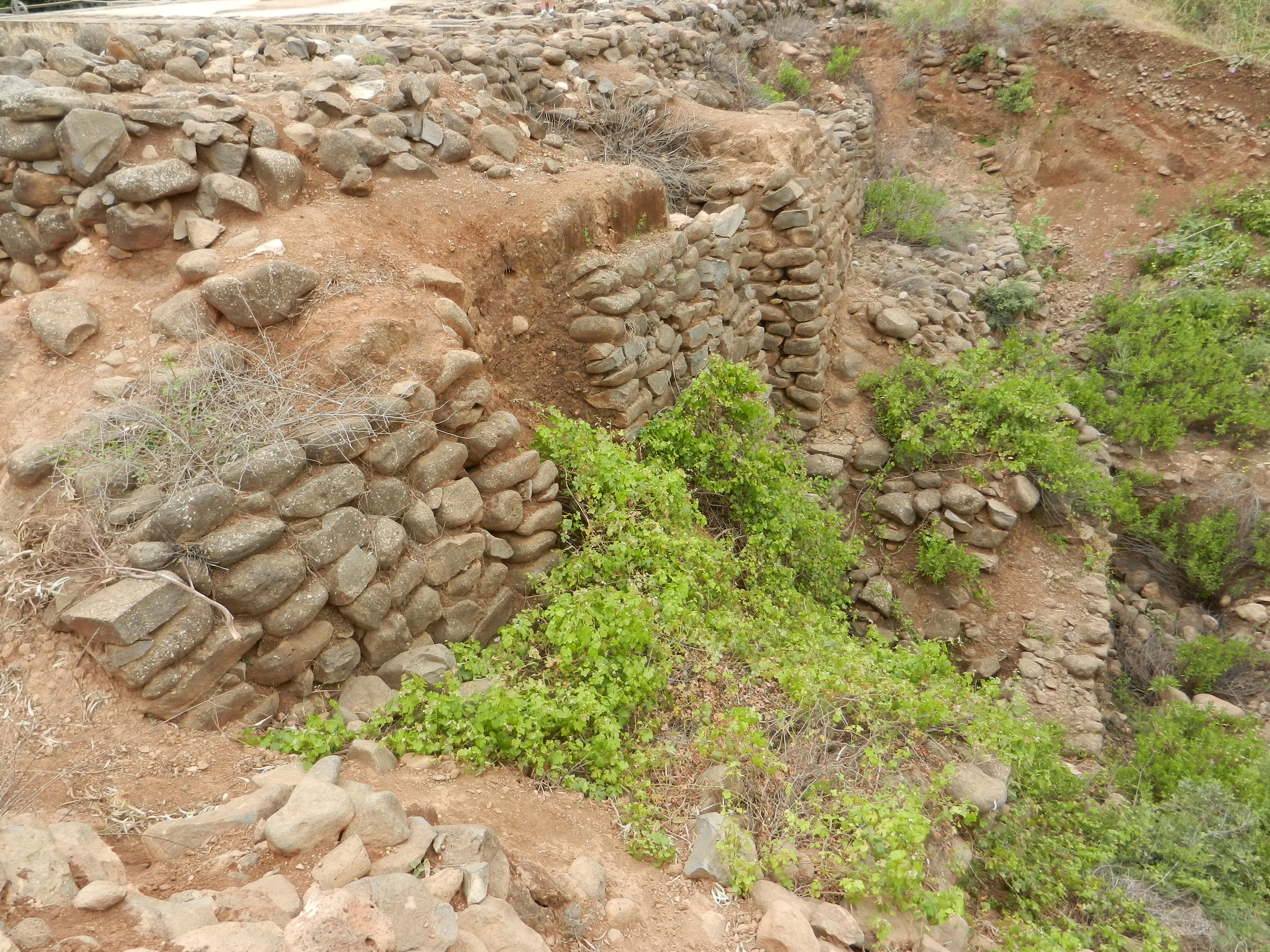 Tel_Dan_Area_T3_and_Rampart.jpg